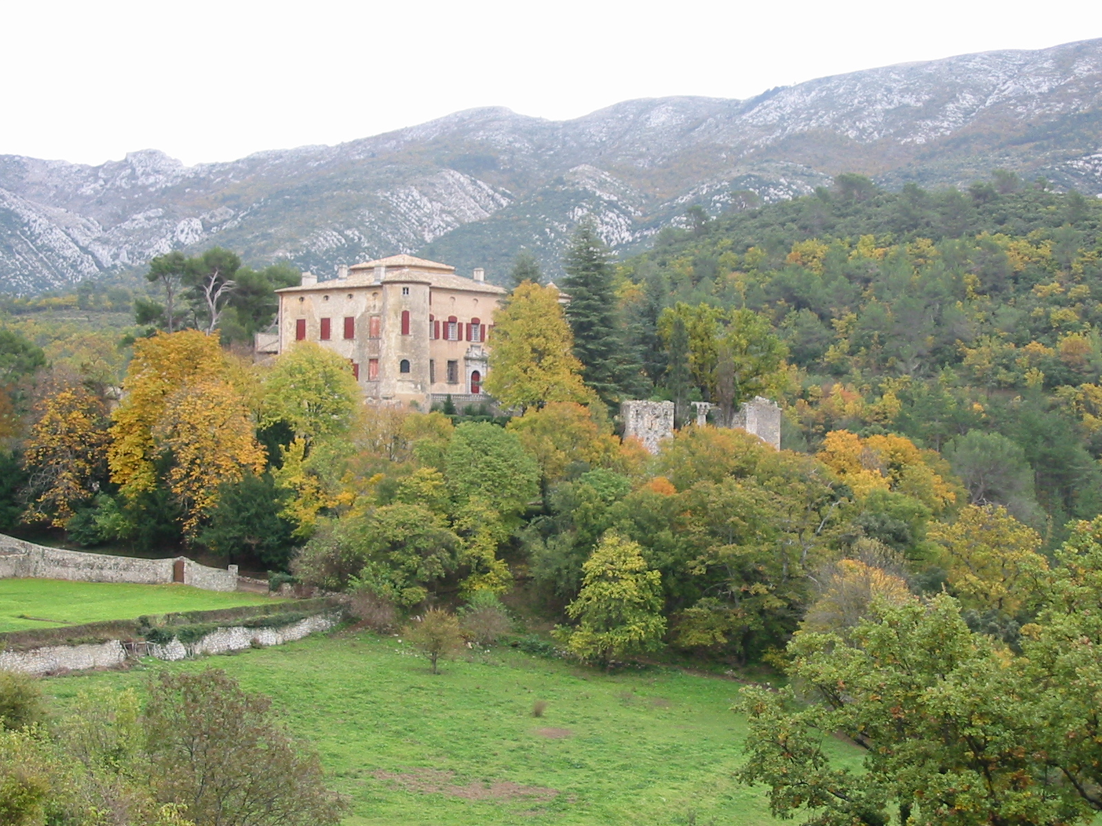 Château de Vauvenargues (Bouches-du-Rhône, France).